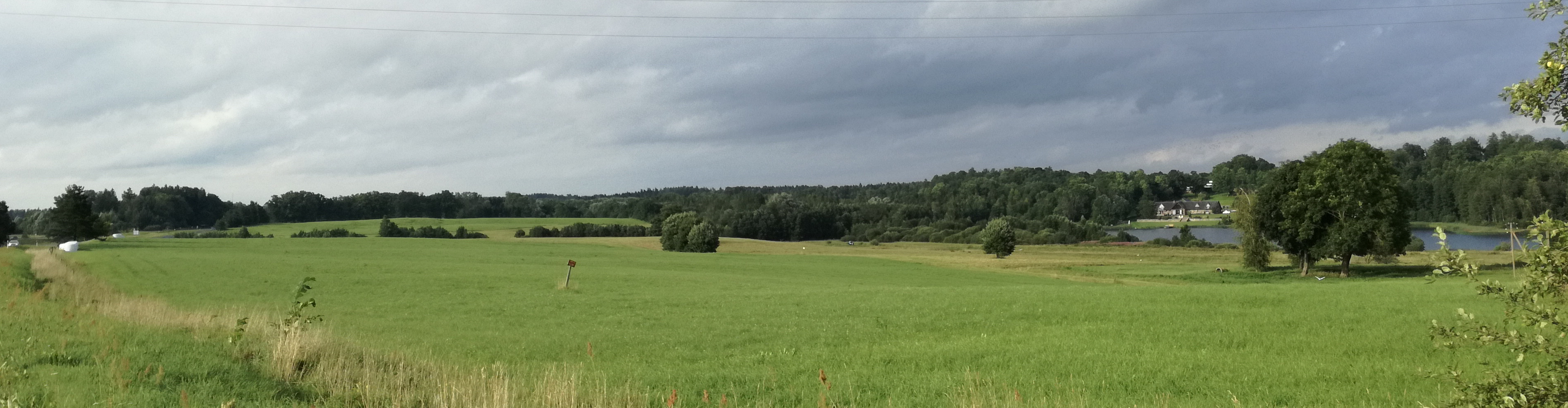 Vaade Viljandi teelt Aindu asulakohale taamal põllusaare juures